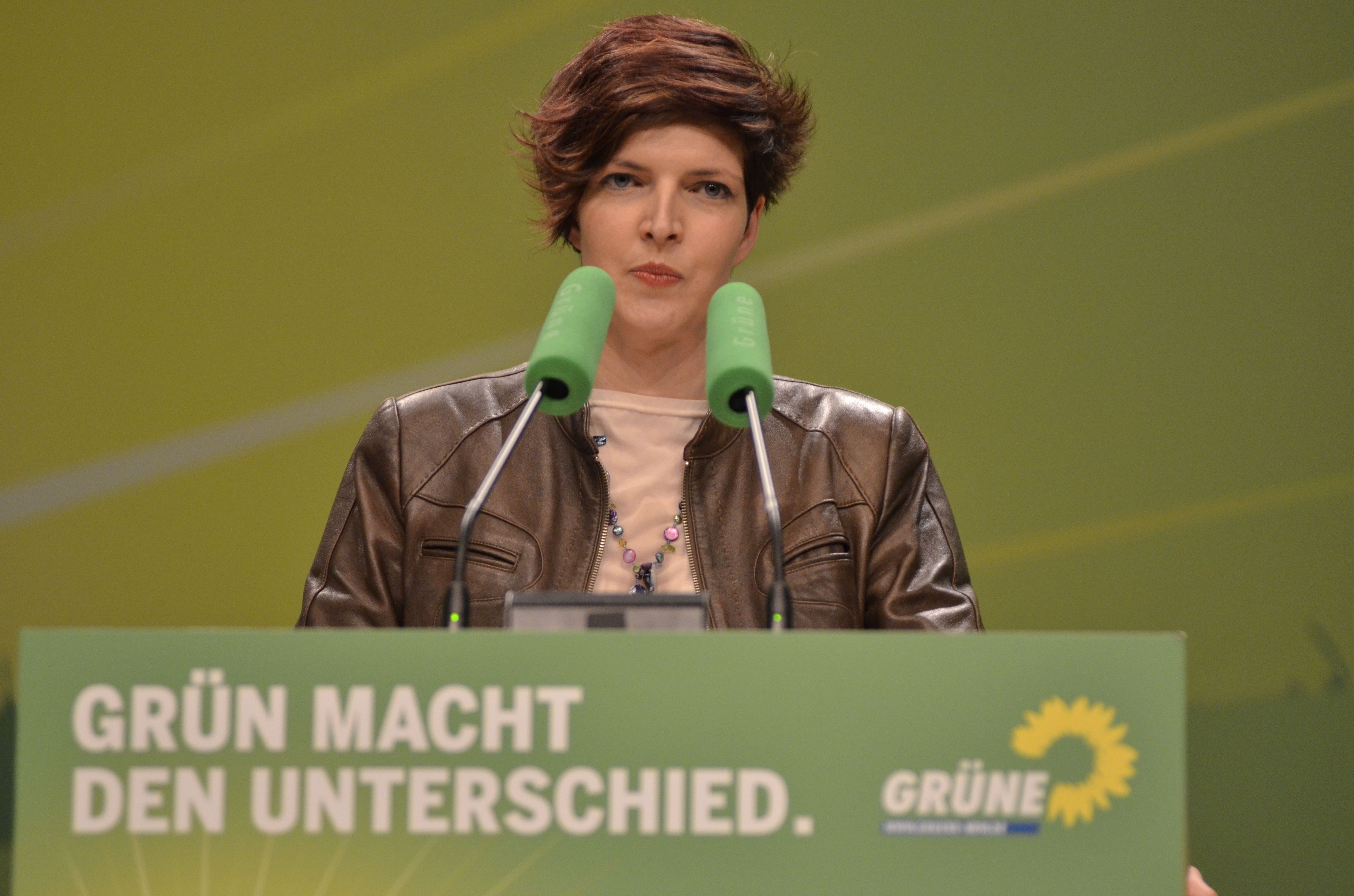 Wibke Brems